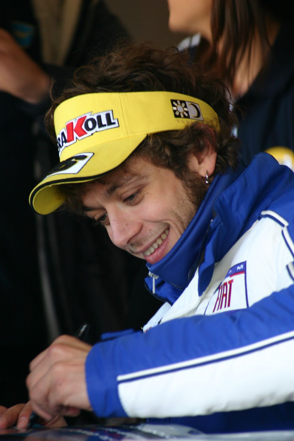 Valentino Rossi